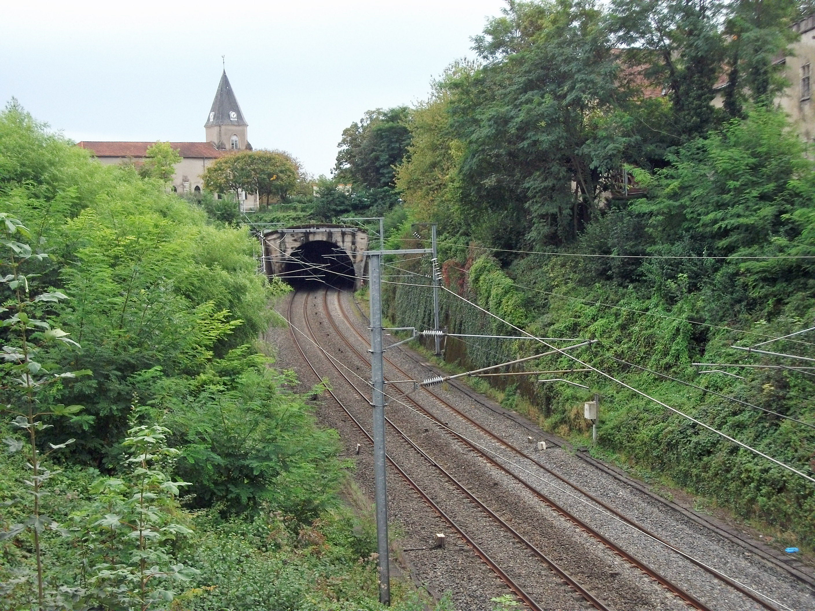 Entrée nord de la galerie d'Abrest avec, au fond, le clocher de l'église.